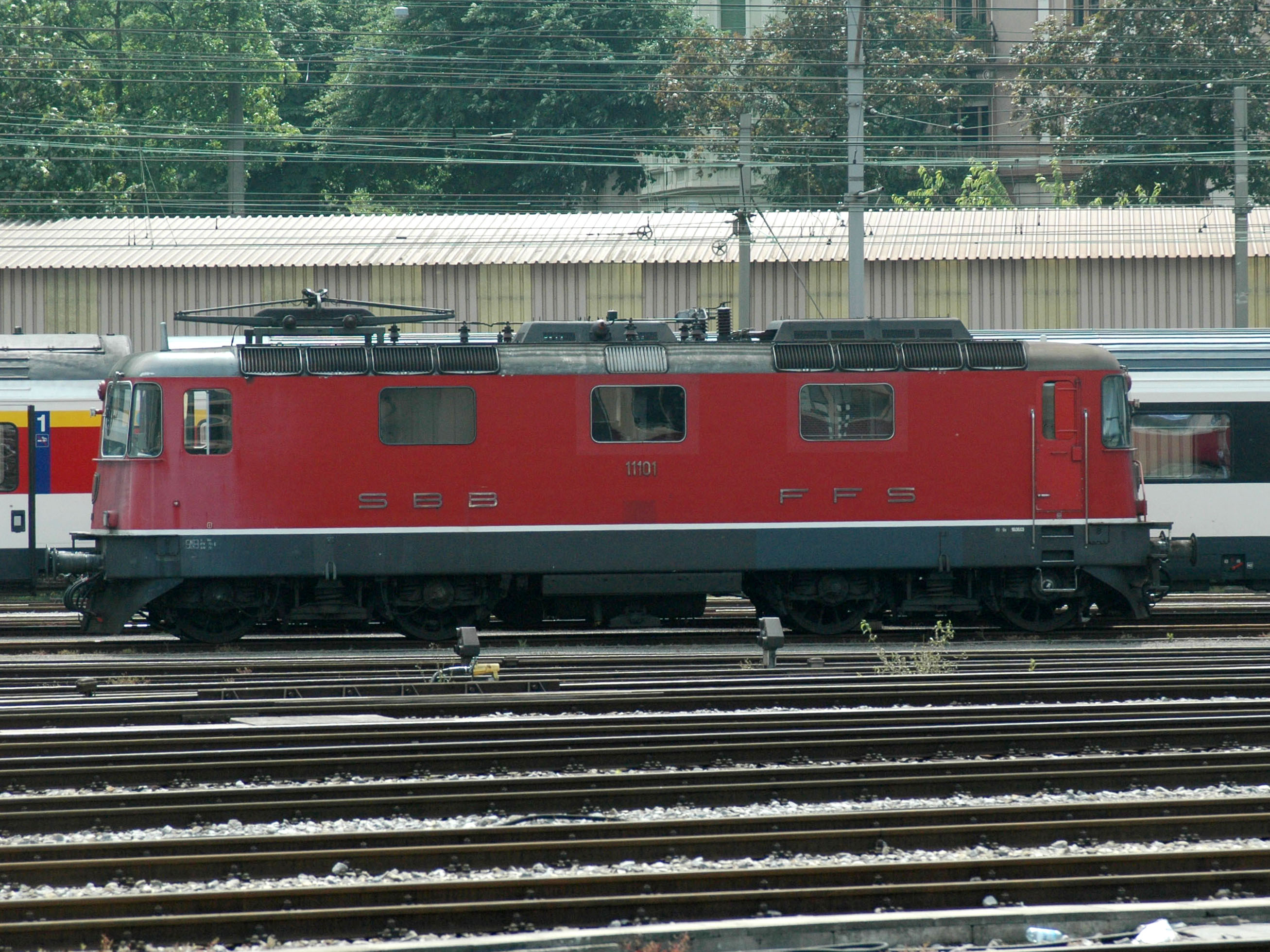 SBB Re 4/4 II 11101 im Bahnhof Basel am 9. Juni 2007. Dies ist der letzte existierende Prototyp dieser Baureihe, u.a. erkennbar an der tiefer angebrachten Beschriftung